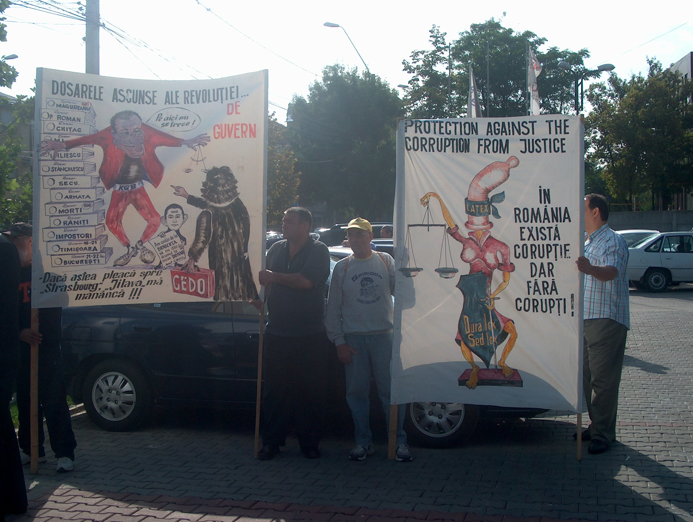 Manifestaţie pentru desecretizarea dosarelor revoluţiei, în faţa clădirii CSM din Bucureşti, România, anul 2009